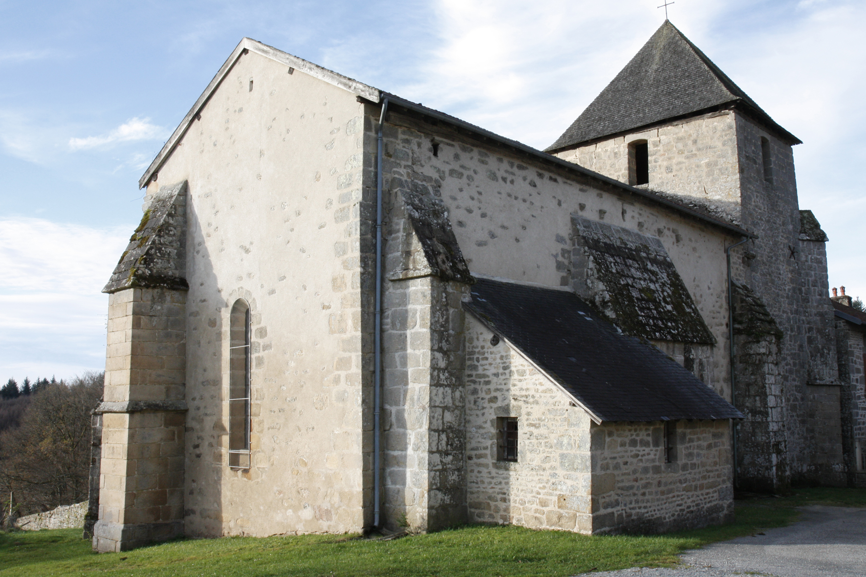 eglise saint-pierre es liens du bourg de saint-pardoux-morterolles